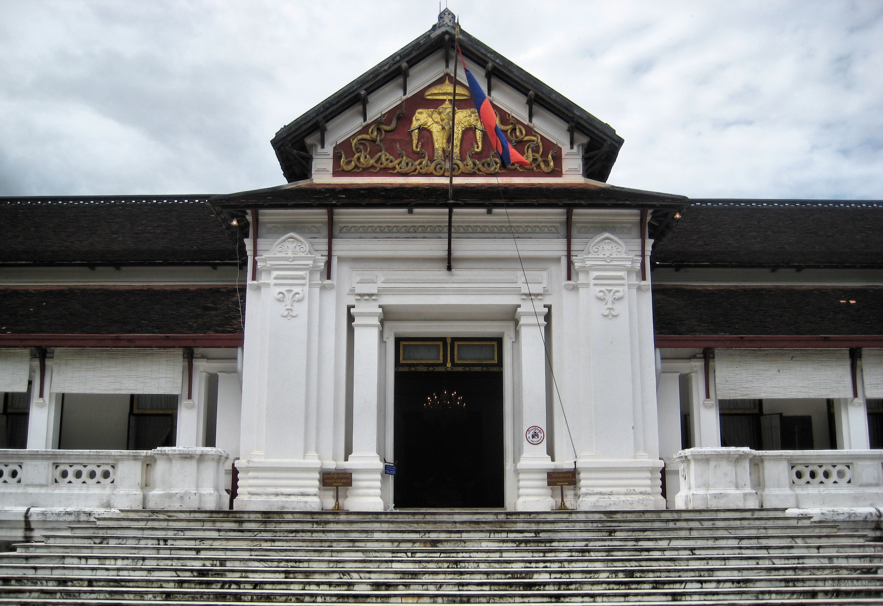 LPB Royal Palace